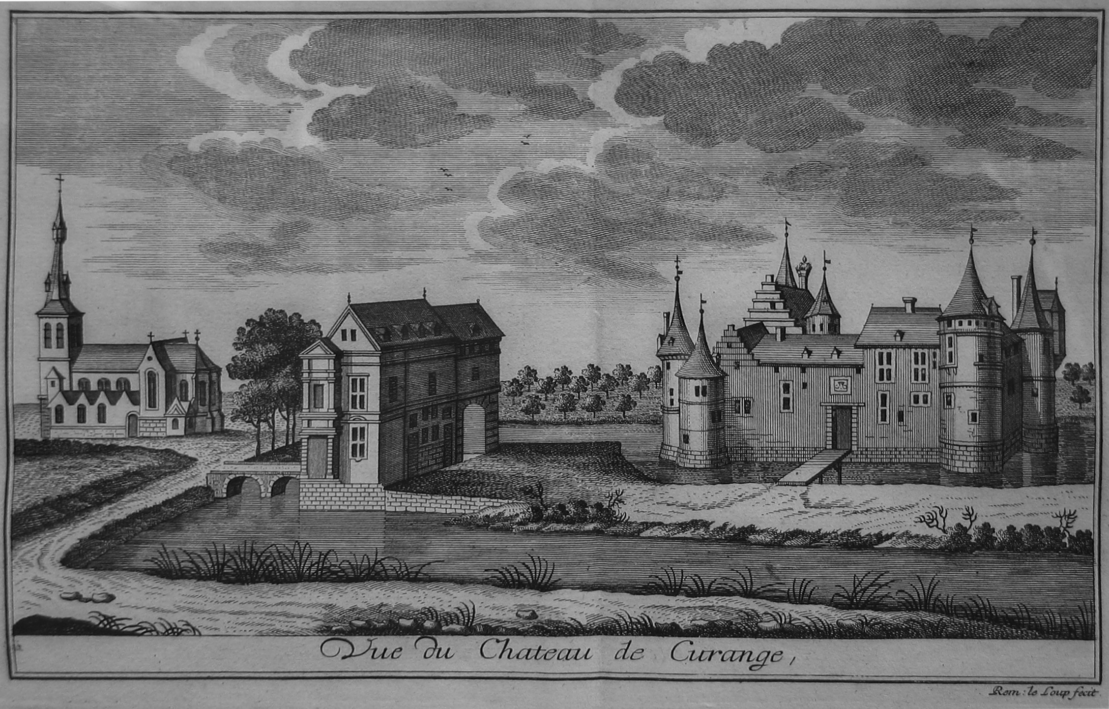 Remacle Leloup (1694-1746) - Kasteel van Kuringen - Hasselt Stadsmus, België